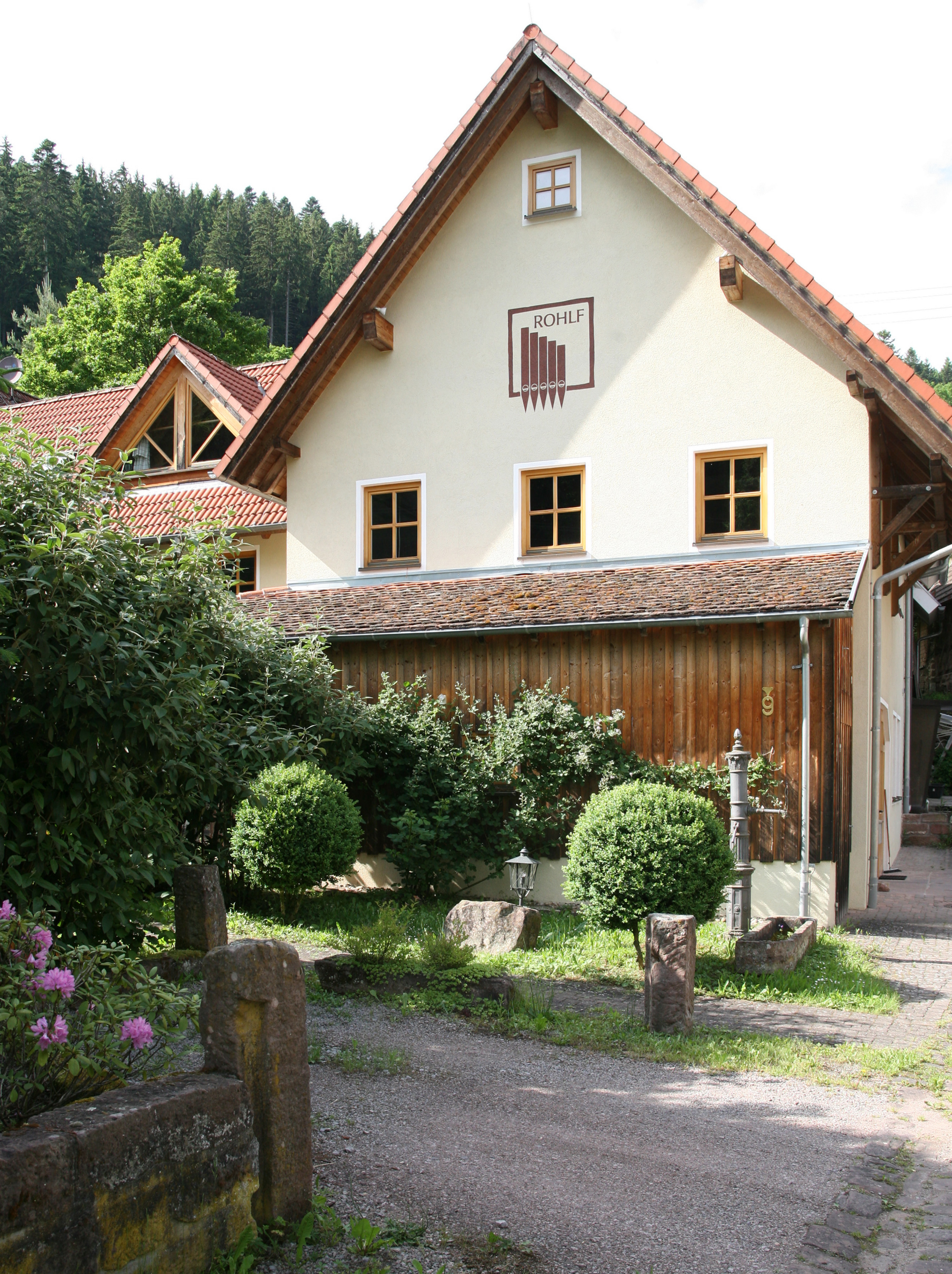 Orgelbau Johannes Rohlf Neubulach, Landkreis Calw, Baden-Württemberg, Deutschland